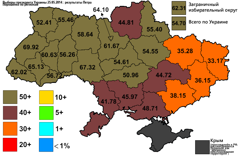 Поддержка Петра Порошенко на выборах 25 мая 2014 года по регионам Украины